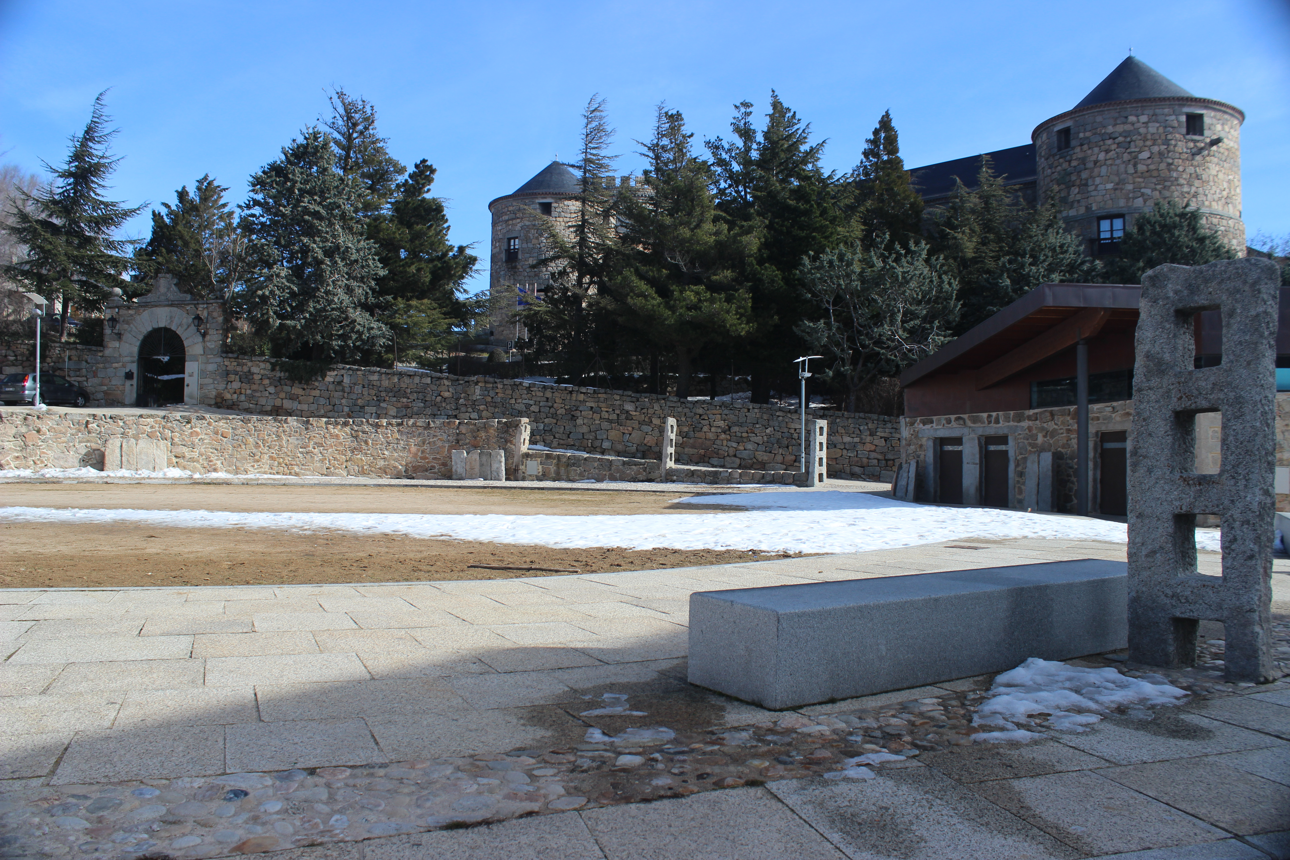 Antigua plaza de toros de Las Navas del Marqués.